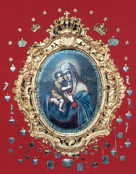 Цудатворная ікона Маці Божай Жыровіцкай у касьцёле сьв. Андрэя ў Слоніме.